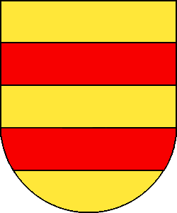 Das Wappen der hochedlen Herren von Isenburg-Kempenich